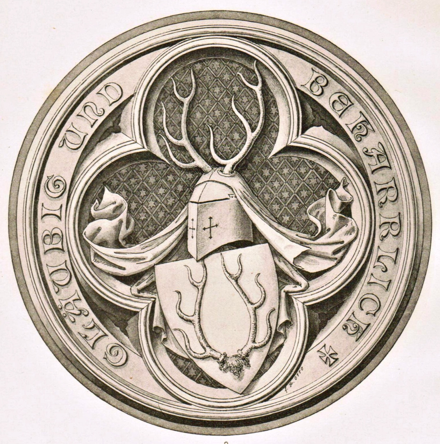 Wappen der Adelsfamilie von Mirbach, Litho von Karl Otto (1830-1902)